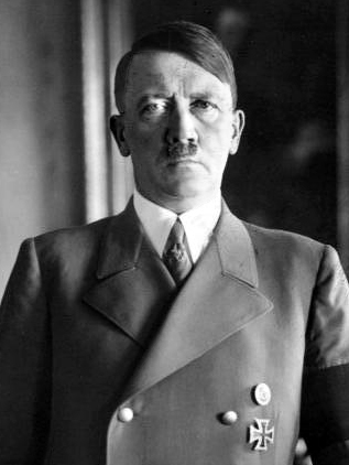 Adolf Hitler Zentralbild Adolf Hitler geb.: 20.4.1889 in Braunau am Inn, gest.: Selbstmord 30.4.1945 in Berlin; Vorsitzender der NSDAP; ab 30.1.1933 Reichskanzler, ab 12.8.1934 Führer und Reichskanzler; 8seit dem 4.2.1938 Oberbefehlshaber der Wehrmacht und ab 19.12.1941 Oberbefehlshaber des Heeres. Er ist hauptverantwortlich für die Ermordung von Millionen Menschen, bereitete den II. Weltkrieg vor und löste ihn aus. Der Verantwortung entzog er sich durch Selbstmord. U.Bz.: eine Aufnahme von 1938 2757-49 [Adolf Hitler (mit Eisernem Kreuz und Verwundeten-Abzeichen) an Schreibtisch stehend (Porträt)] Abgebildete Personen: Hitler, Adolf: Reichskanzler, Deutschland